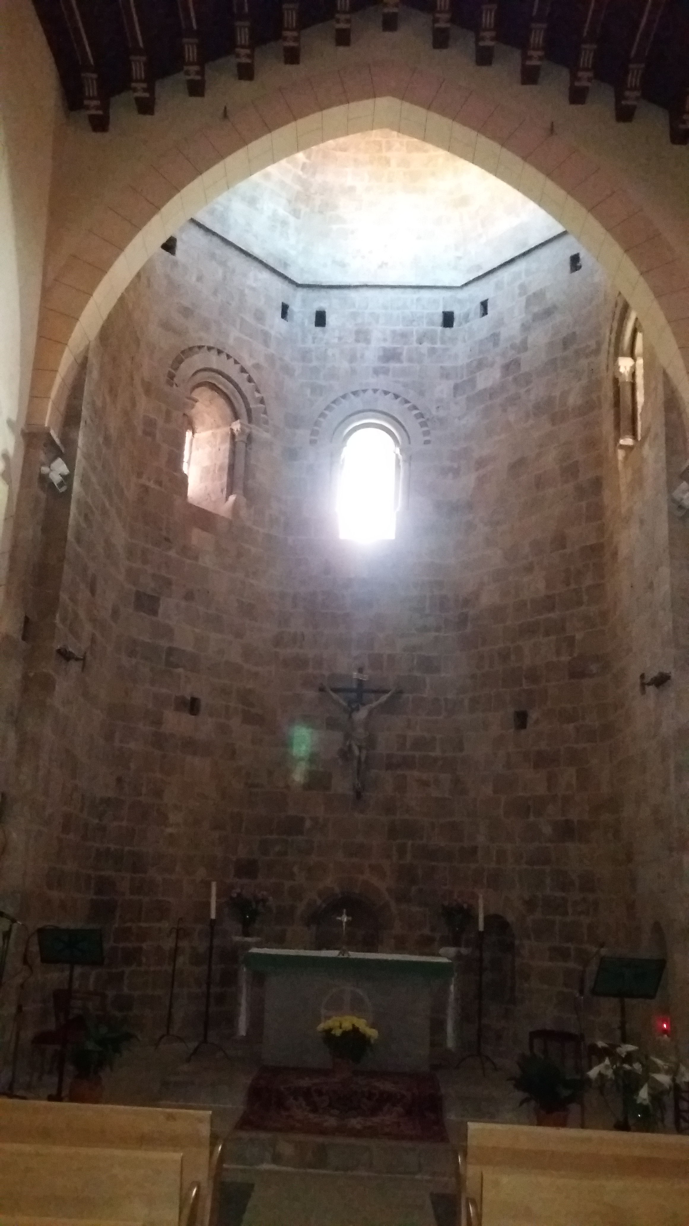 Interior de l'església parroquial de Santa Maria la Mar